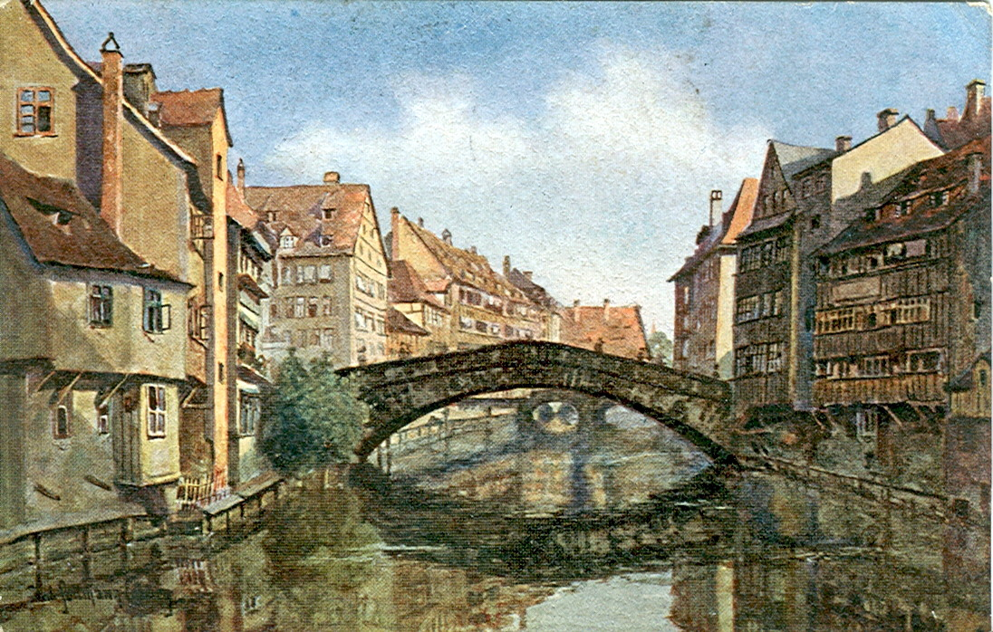 Postkarte, datiert 29.10.1915. Beschriftung: "Nürnberg - Fleischbrücke".